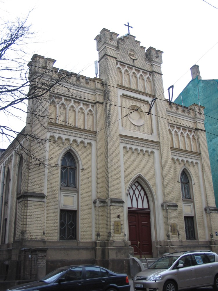 Vīlandes iela